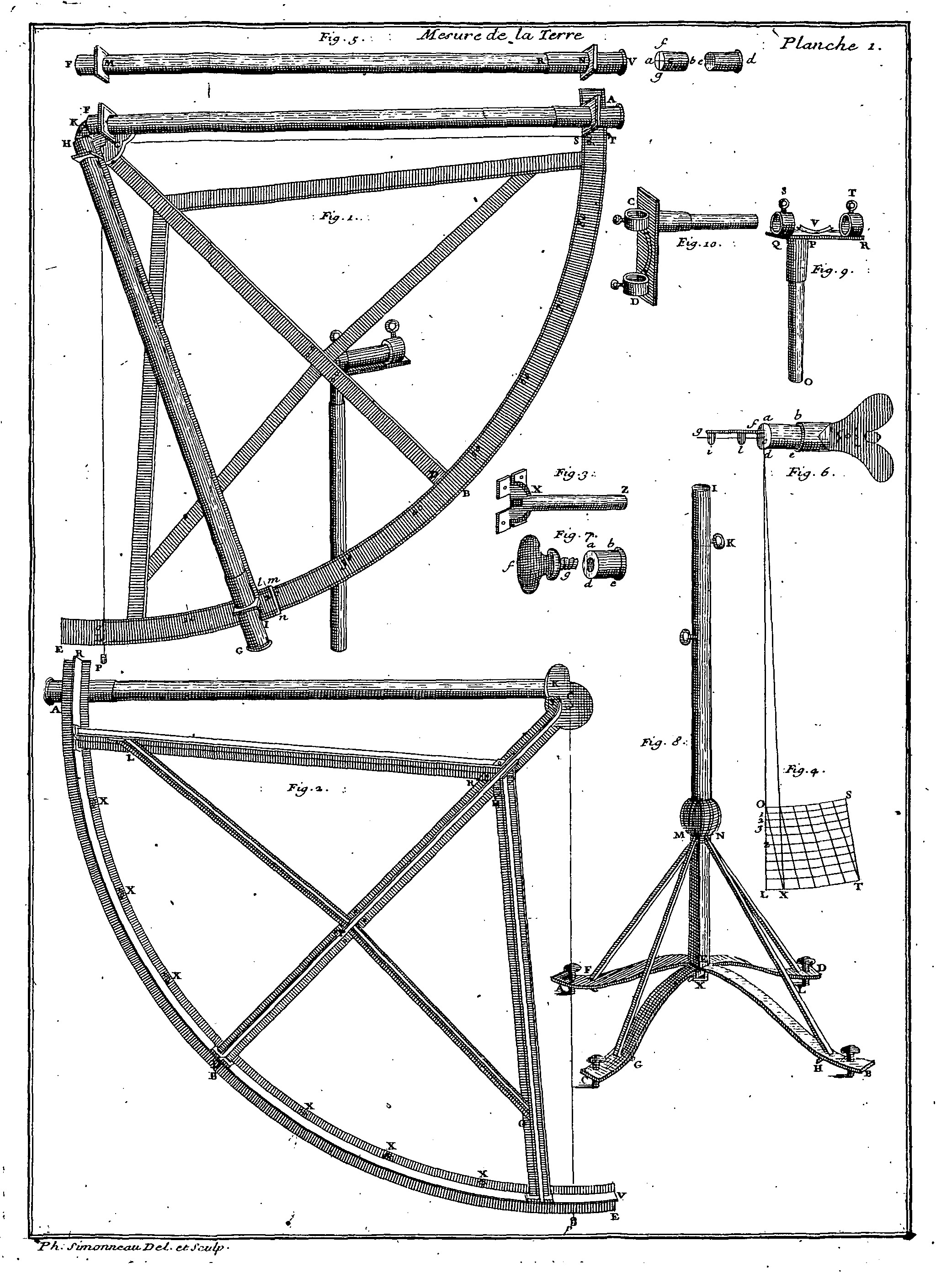 Quart de cercle suivant Jacques Cassini.